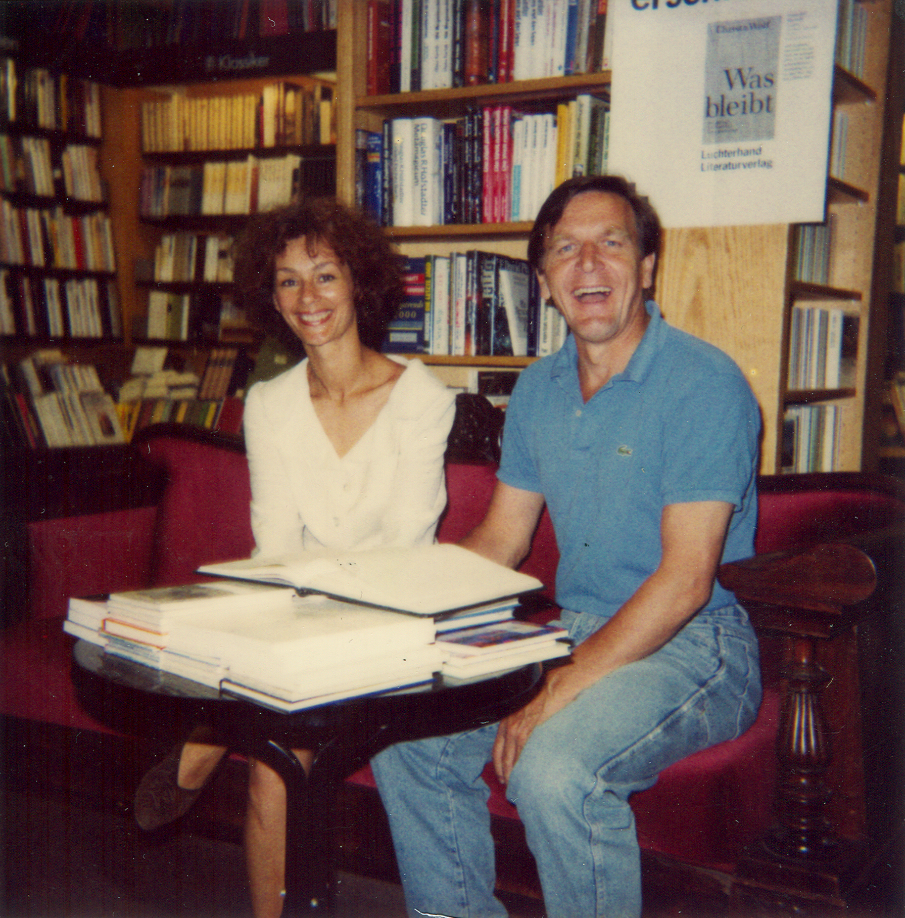 Hiltrud Schröder, hier am 27. Juli 1990 mit ihrem damaligen Ehemann Gerhard Schröder kurz nach seiner Wahl zum Niedersächsischen Ministerpräsidenten, auf dem Roten Literatursofa der Georgsbuchhandlung von Otto Stender in der Georgstraße 52 in Hannover, der auch die Polaroid-Sofortbildkamera bediente ...